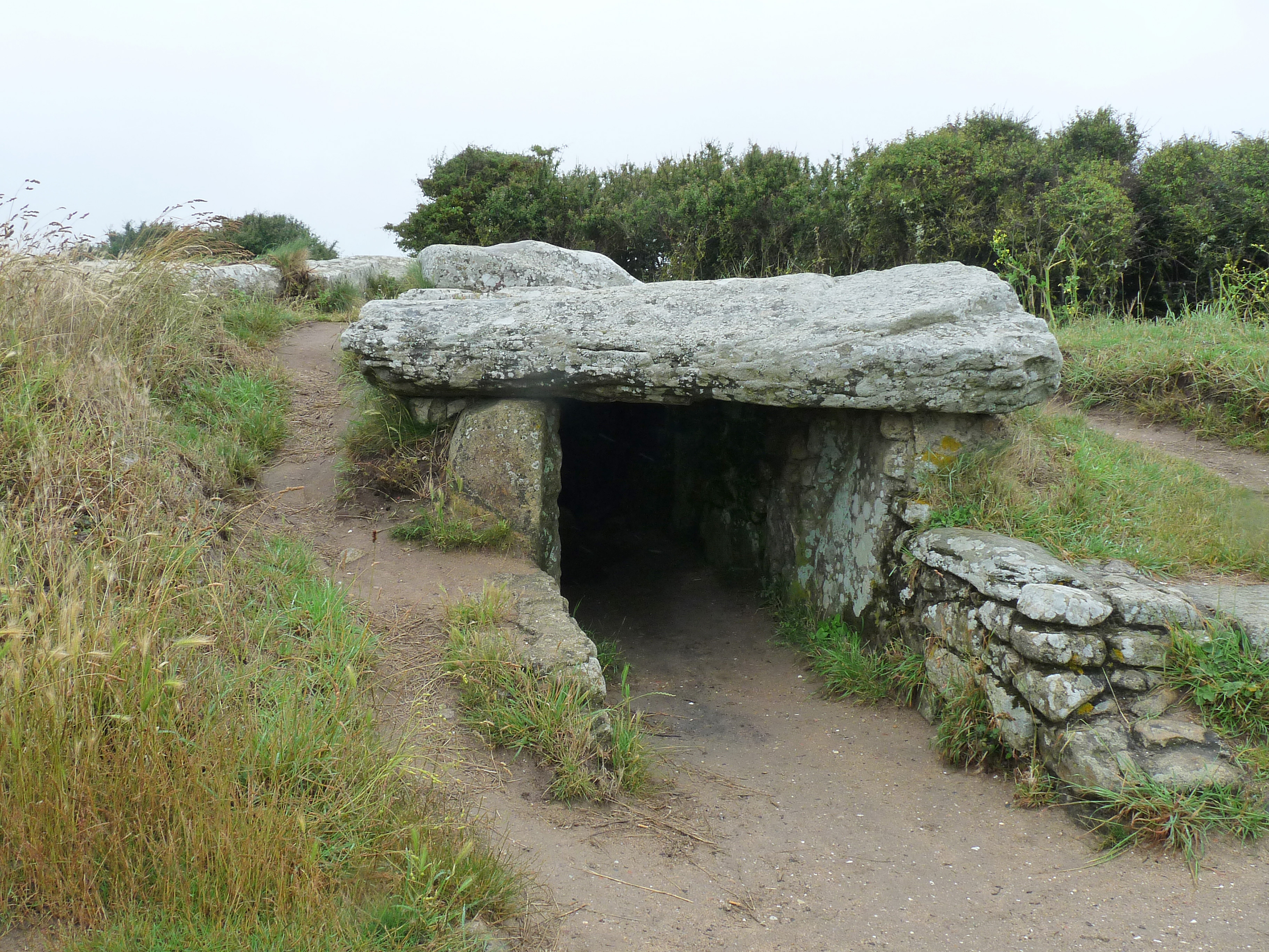 Dolmen des Pierres Plates (Morbihan)